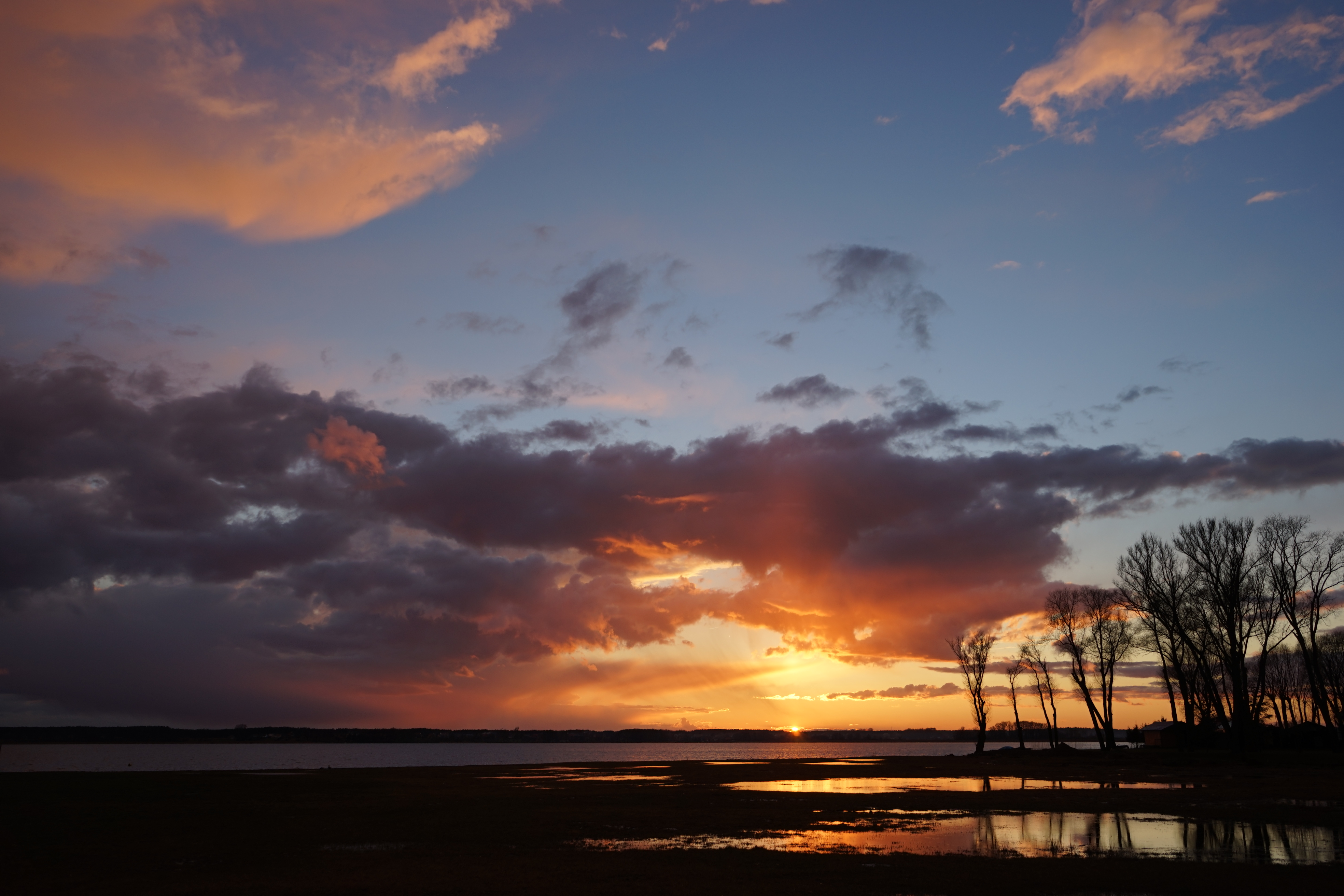 Obszar specjalnej ochrony ptaków Jeziora Pszczewskie i Dolina Obry. This is a photography of Natura 2000 protected area with ID PLB080005